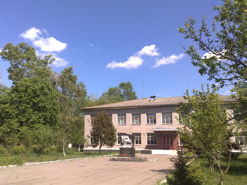 Школа